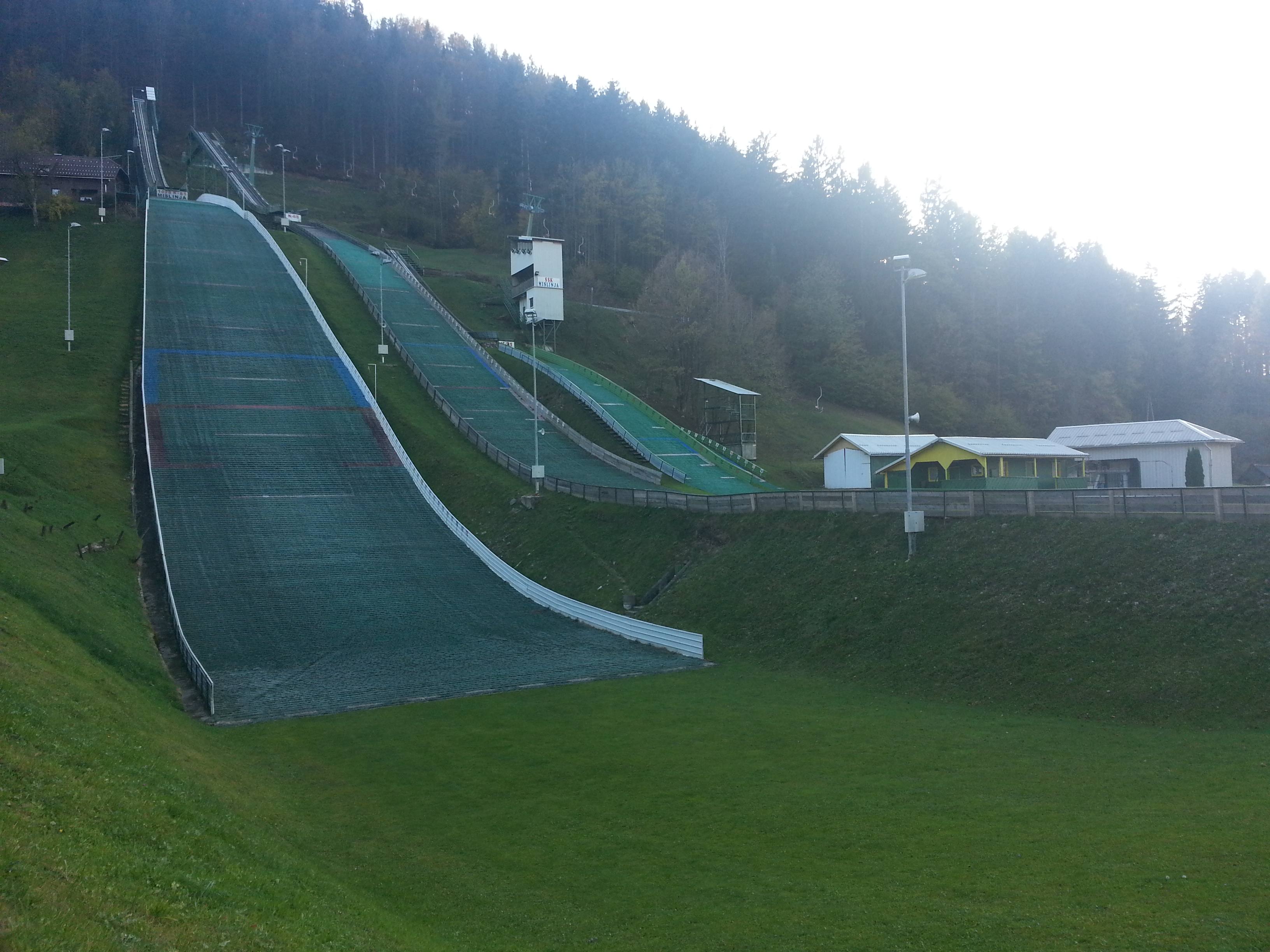 Smučarsko skakalni objekt v Mislinji.